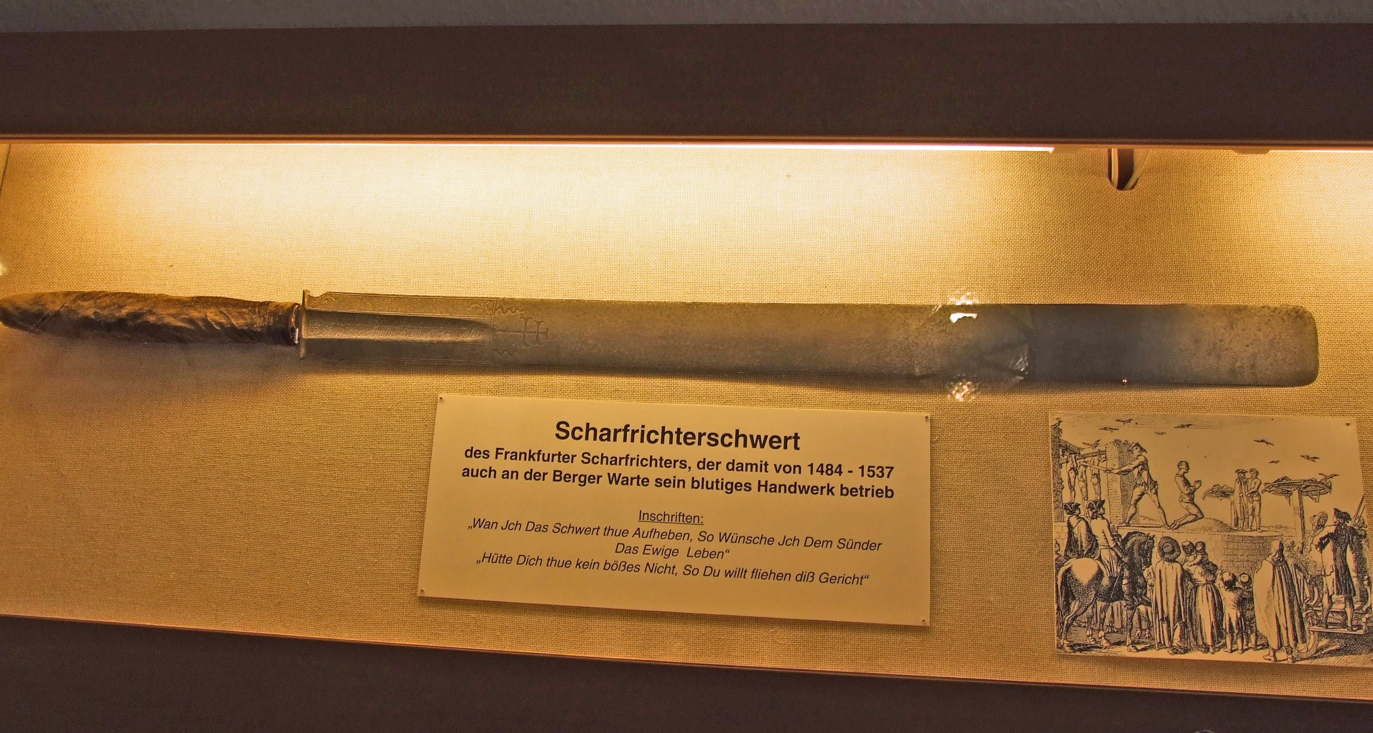 Schwert (mit eingraviertem Sinnspruch) des Frankfurter Scharfrichters, der - zwischen 1484 und 1537 - damit seinen Beruf auch an der Berger Warte ausuebte. Im Heimatmuseum in Bergen-Enkheim.